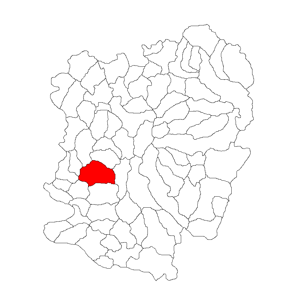 Categorie:Hărţi ale judeţului Caraş-Severin